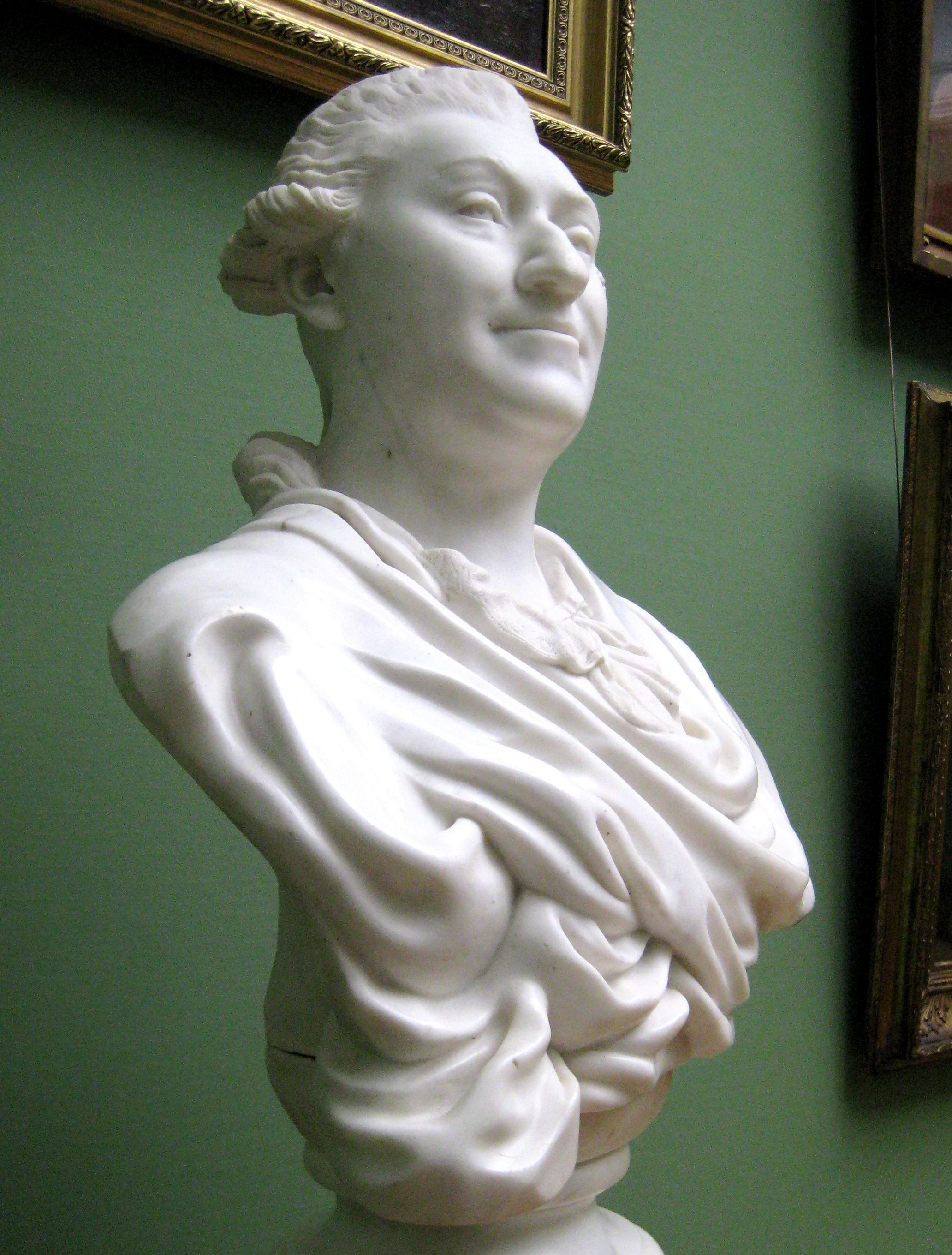 Иван Орлов. Бюст работы Ф. Шубина. 1778. ГТГ